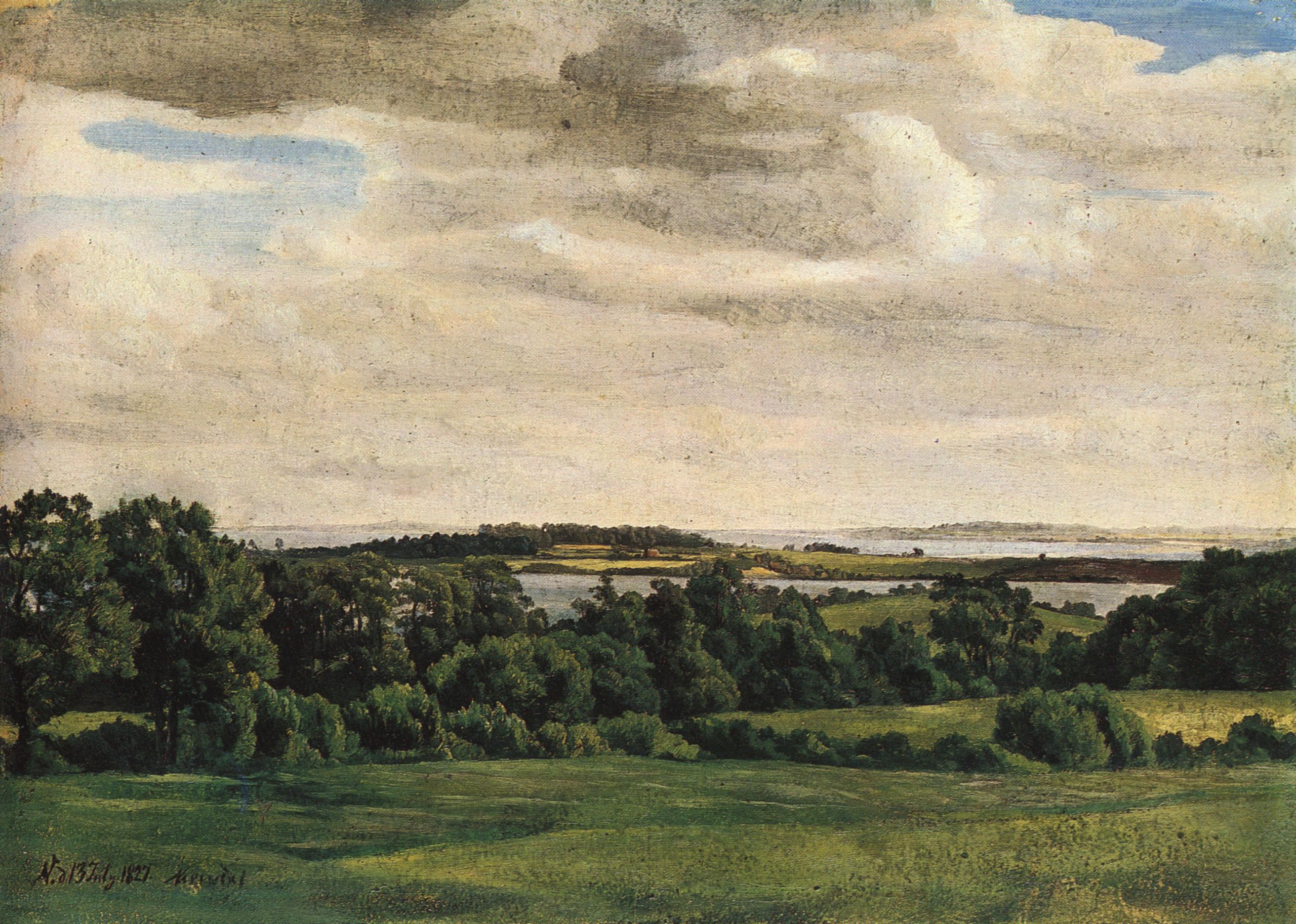 Blick von Stöfs über den Großen Binnensee, 13. Juli 1827, Waterneversdorf